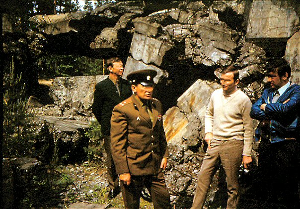 Reste von Befestigungen im Gebiet Wyborg